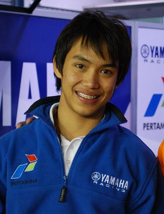 Doni Tata Pradita